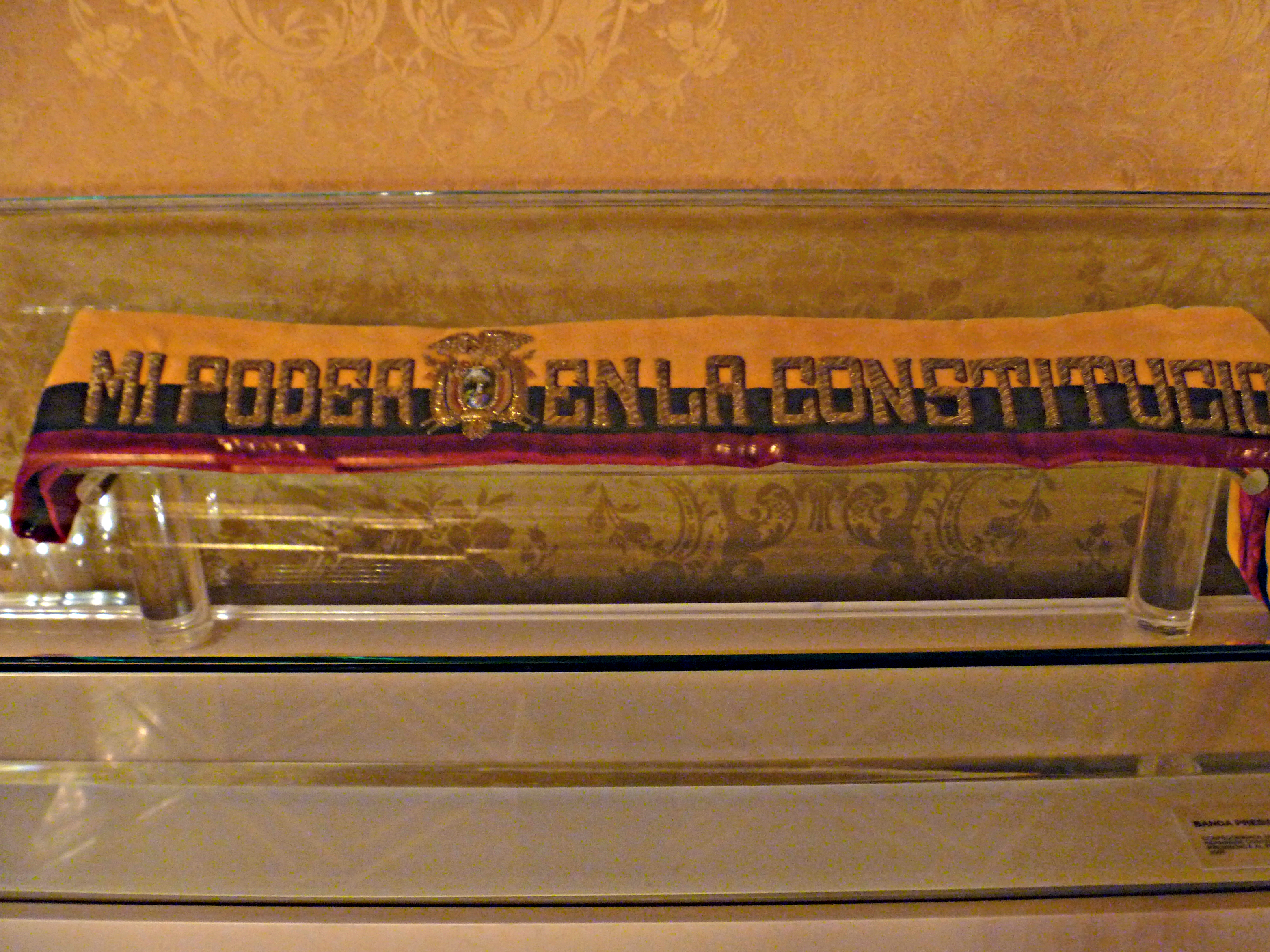 Esta vitrina, ubicada en el Salón Amarillo del Palacio de Carondelet, exhibe la banda presidencial con la que Rafael Correa fue investido como Presidente de la República del Ecuador. Bordad con hilos de oro y plata por monjas de claustro de un convento de la ciudad de Sangolquí.